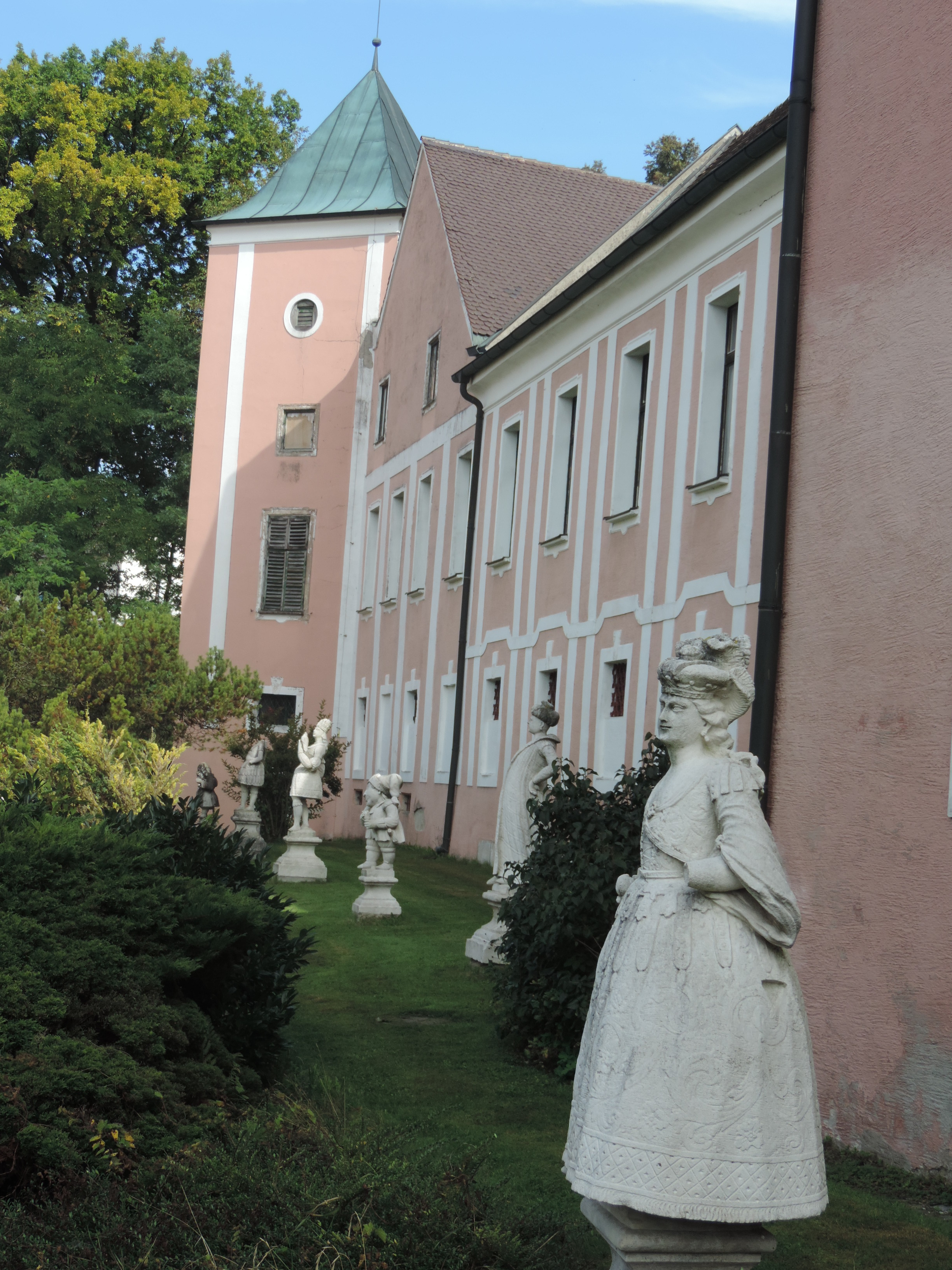 Vorgarten Schloss Sinning